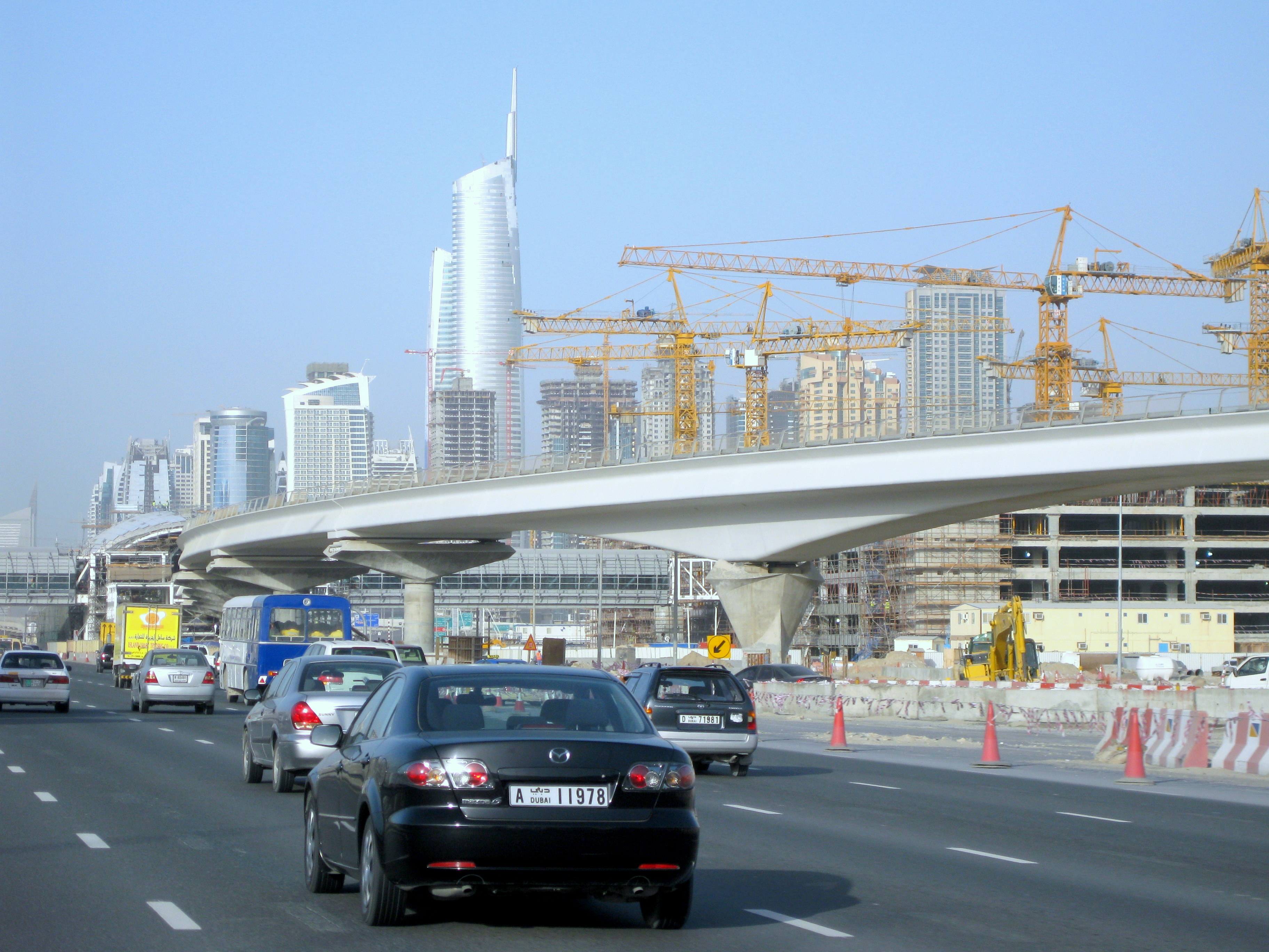 Dubai Metro Project